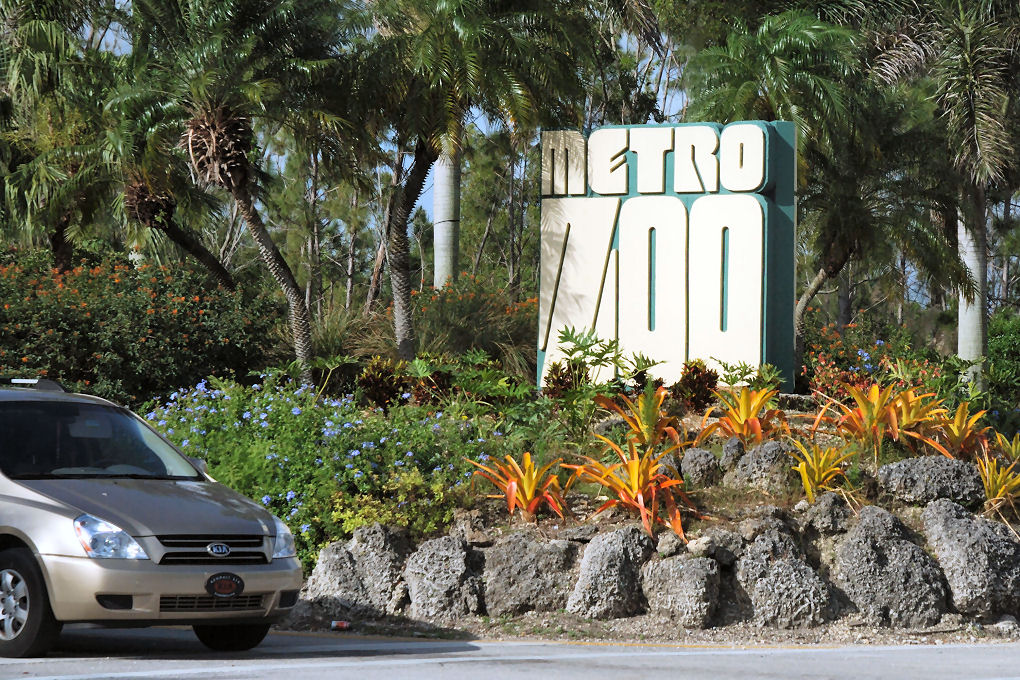 Miami's Metrozoo entrance